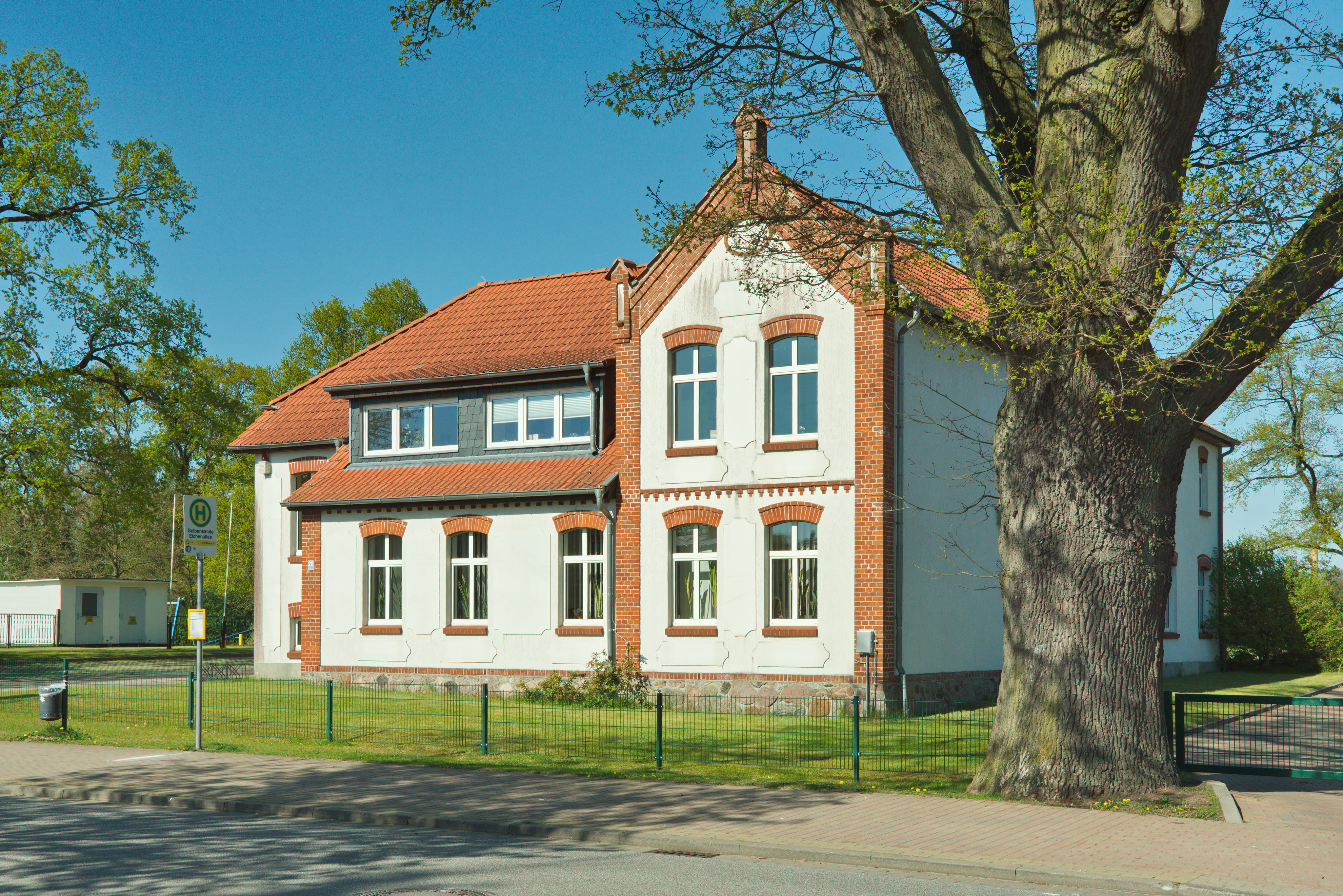 Verwaltungssitz des Amtes Rostocker Heide im alten Schulgebäude von Gelbensande